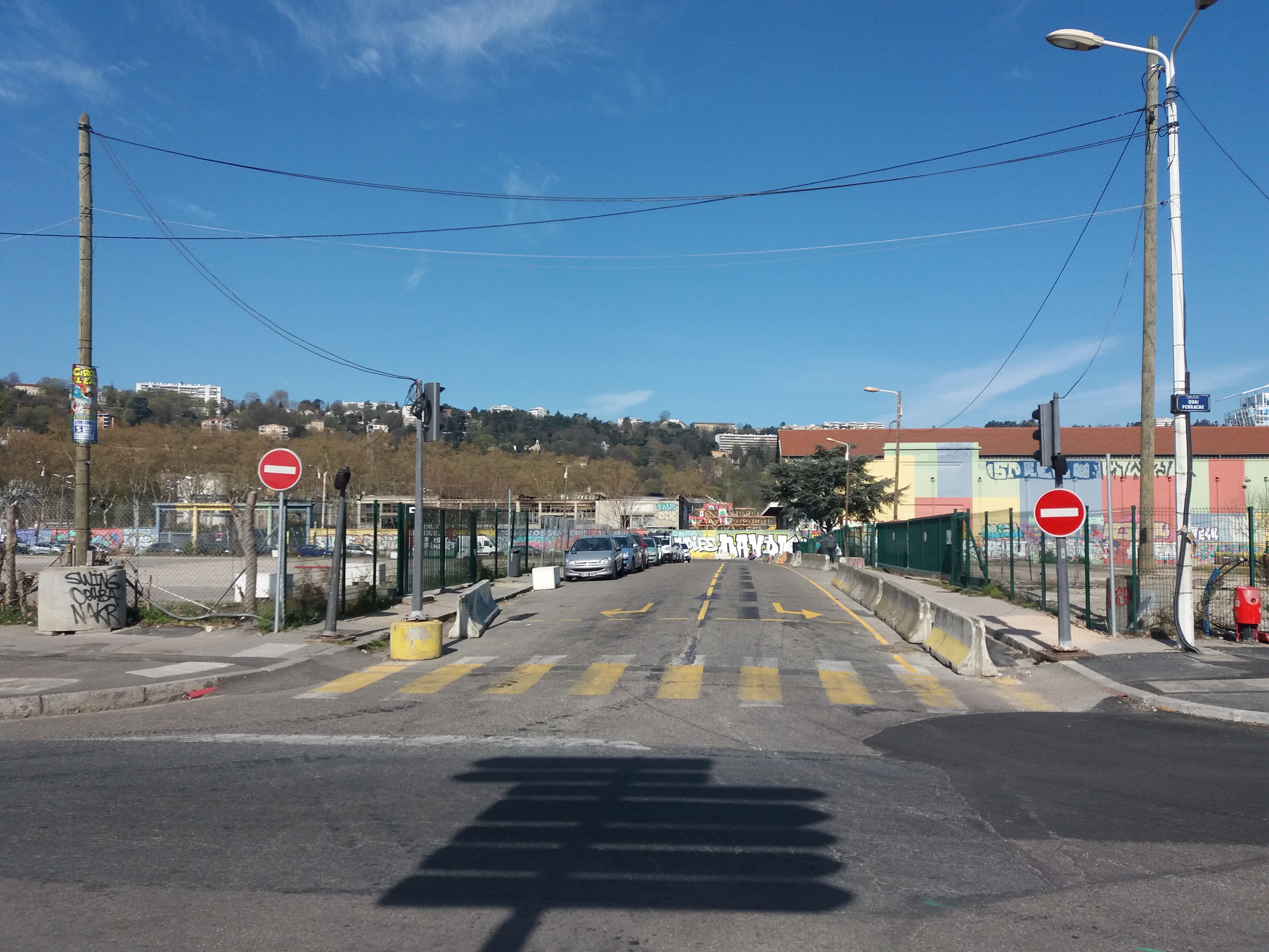 Depuis le quai Perrache.